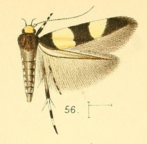 Macrobathra fasciata